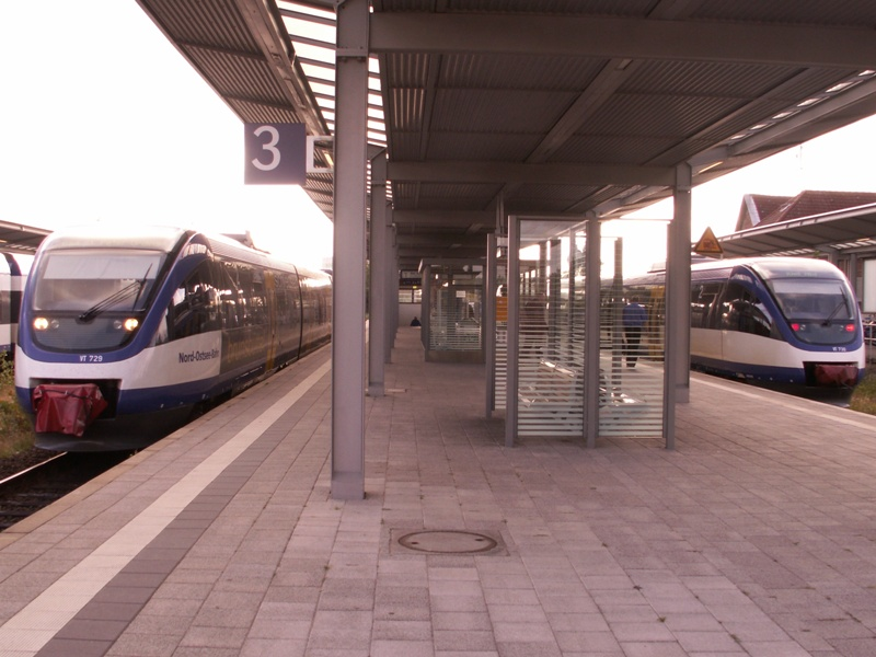 Bf Husum